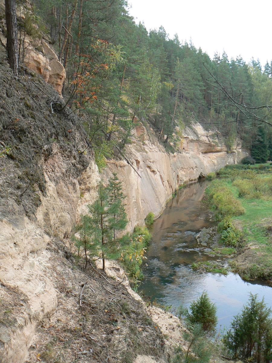 Härma müür